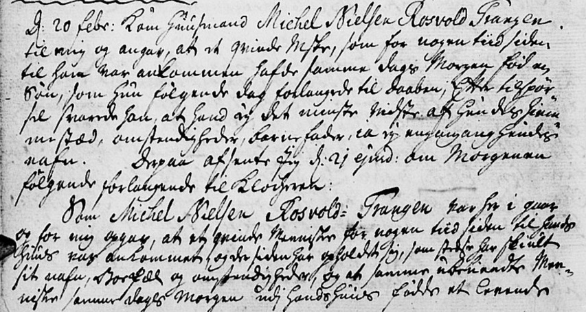 Bildet viser første del av innførselen vedr. Michael Rosings fødsel 20. februar 1756